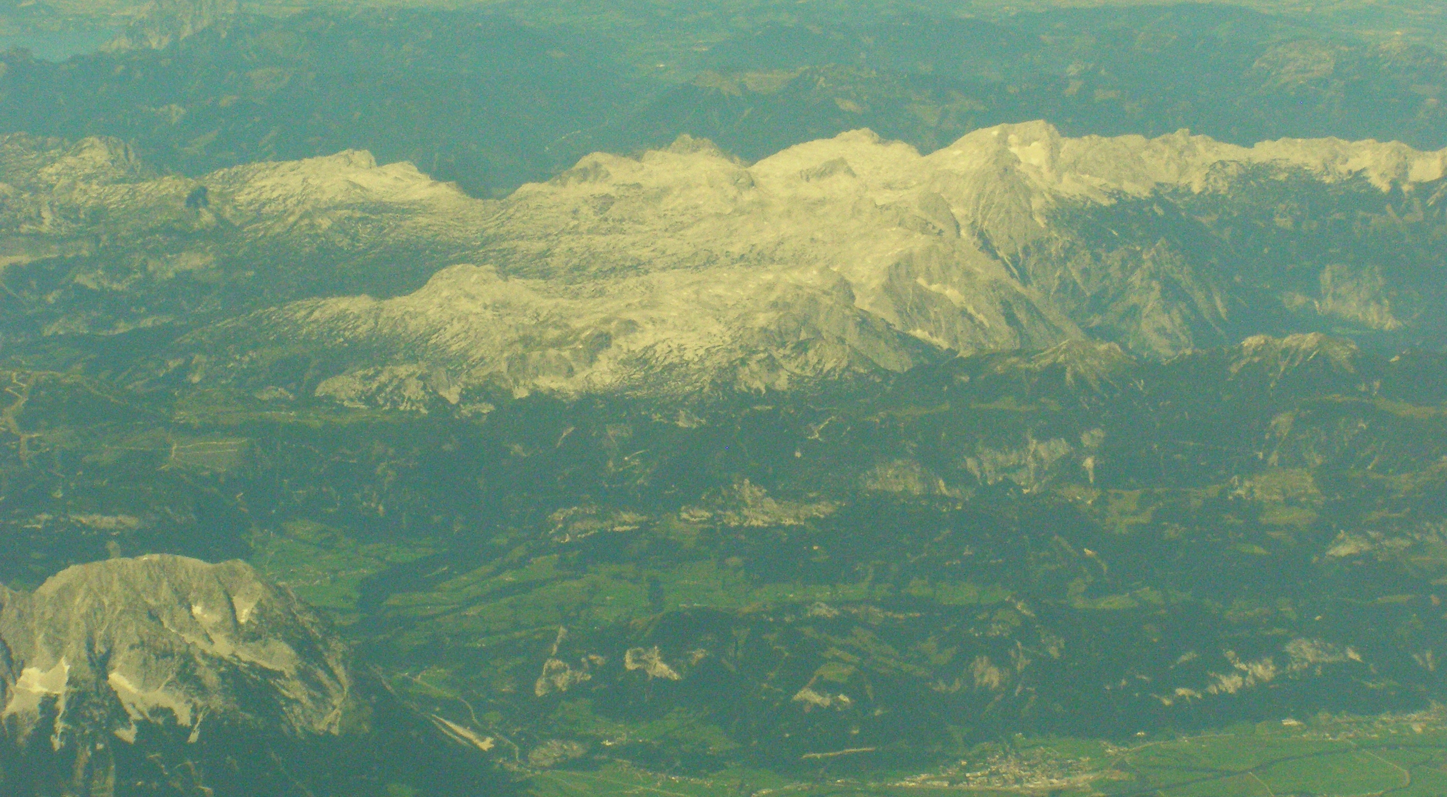 Góry Martwe